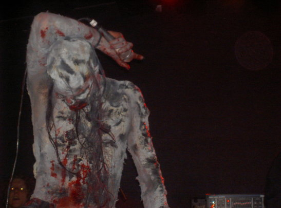 Own work